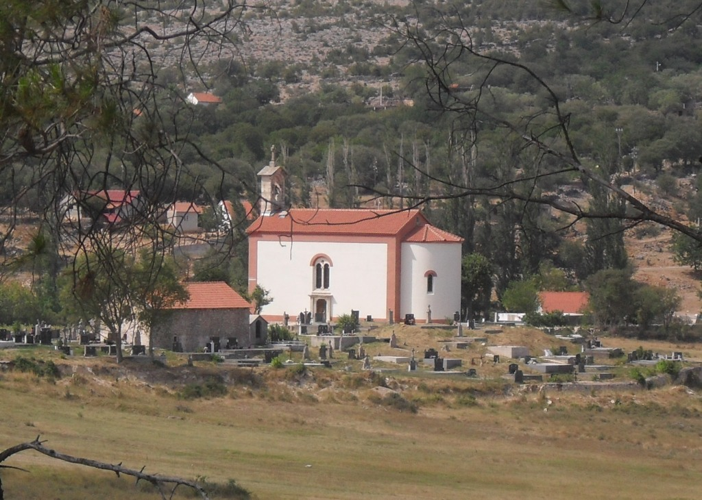 Храм Српске православне цркве Св. Георгија у Жегару, односно Каштелу Жегарском, Далмација